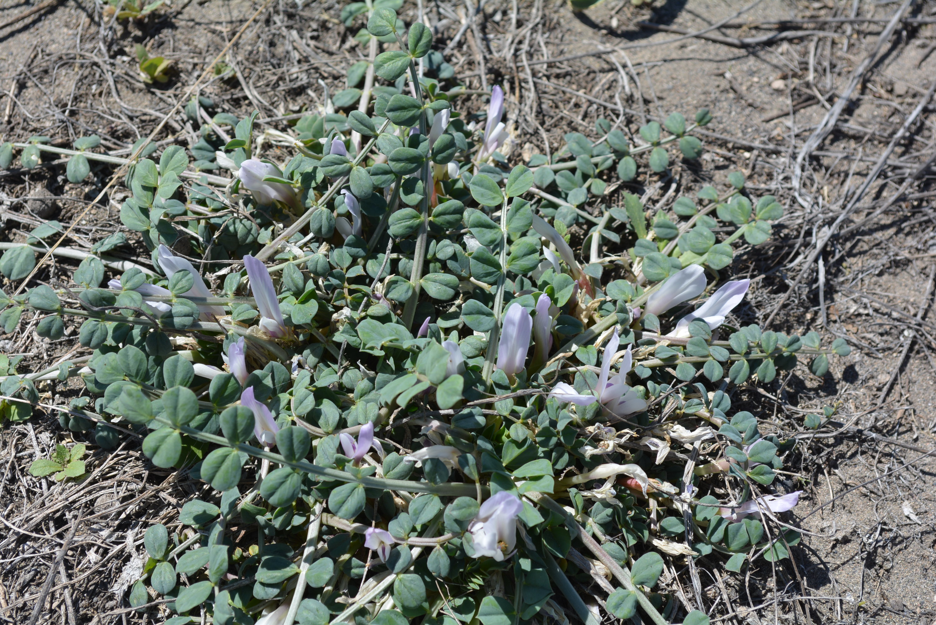 Государственный заказник «Гораванские пески»